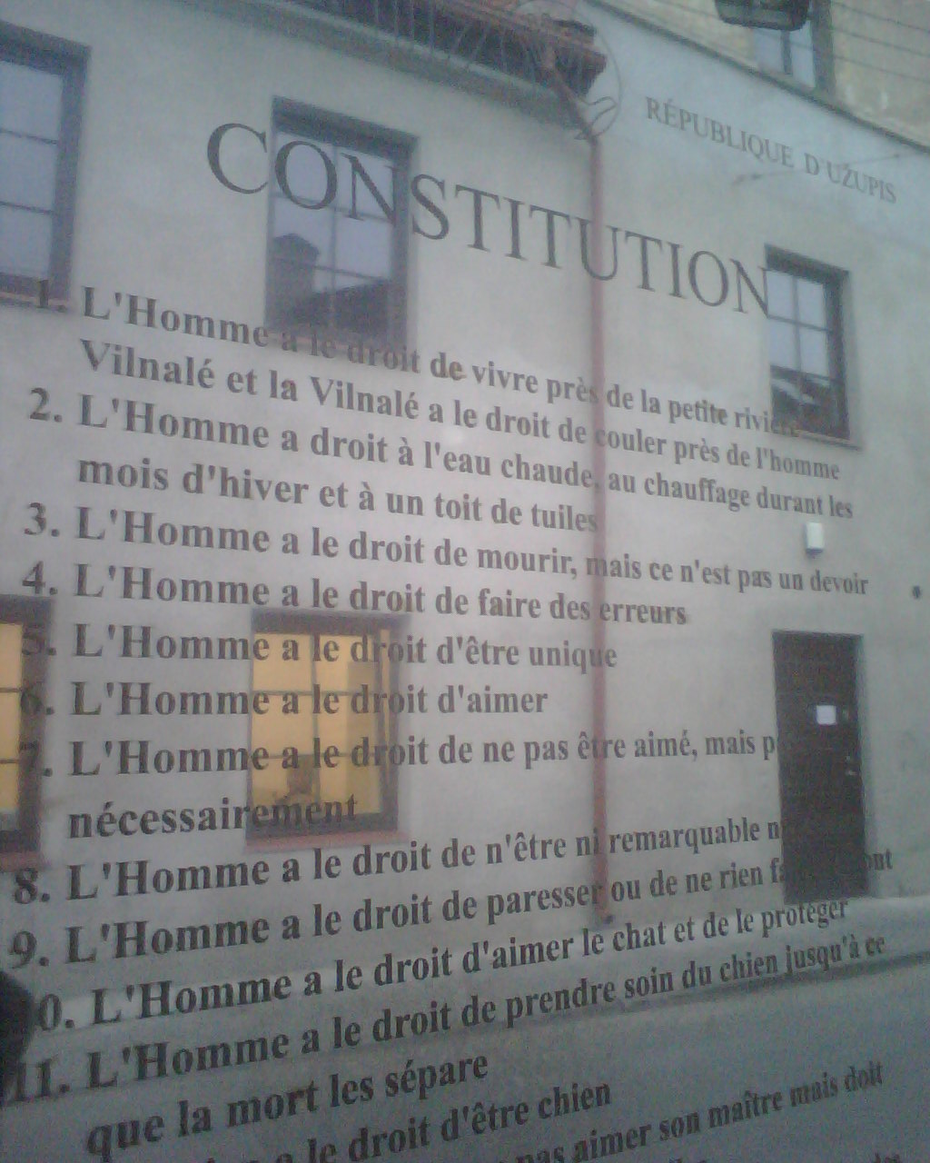 Photo de la plaque en français de la constitution de la République d'Uzupis